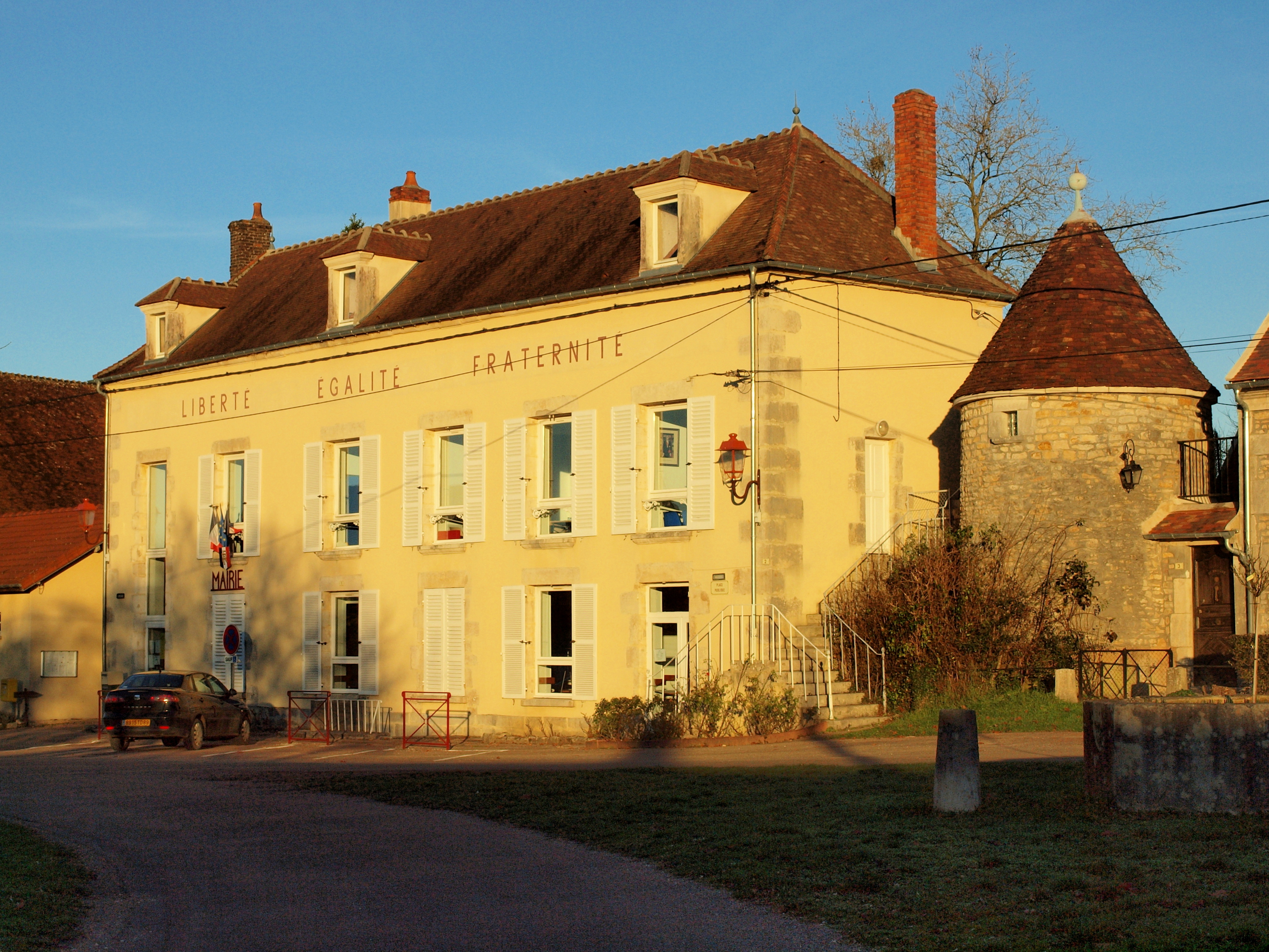 Mairie d'Asnières-sous-Bois (Yonne, France)